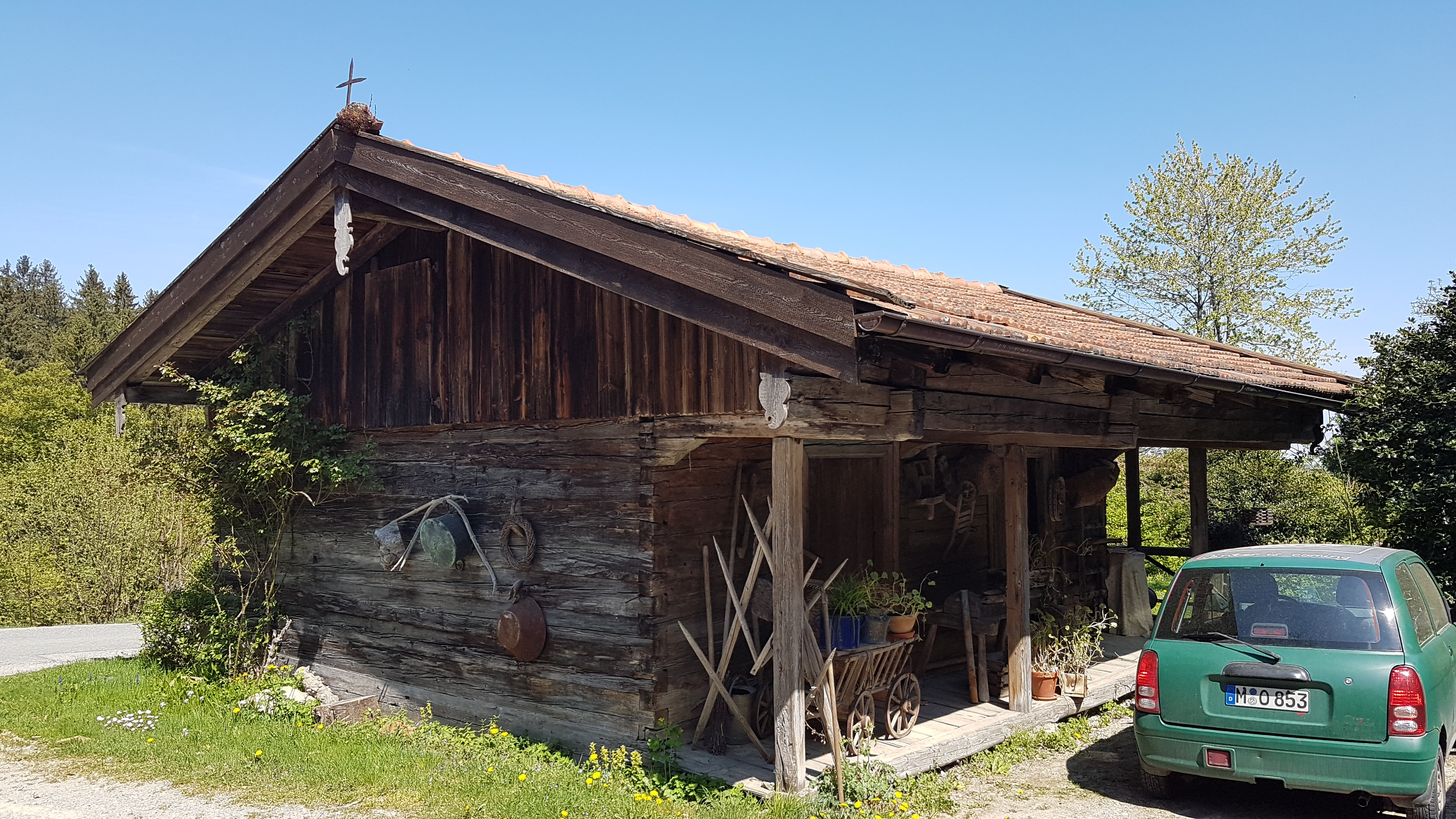 Günderer 1 (Weyarn)